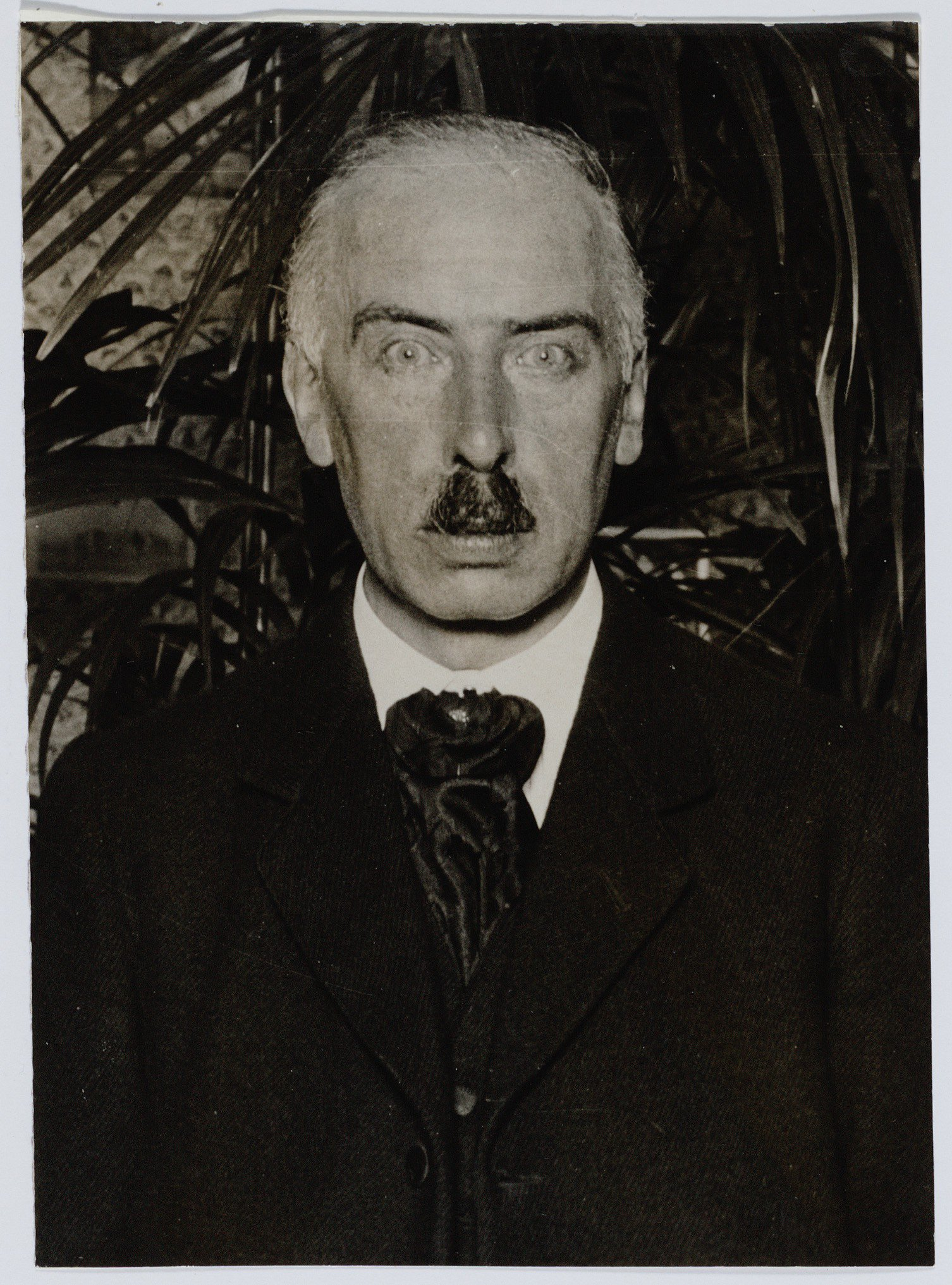 Arie Keppler (1877/04-04-1941) Directeur Woningdienst.